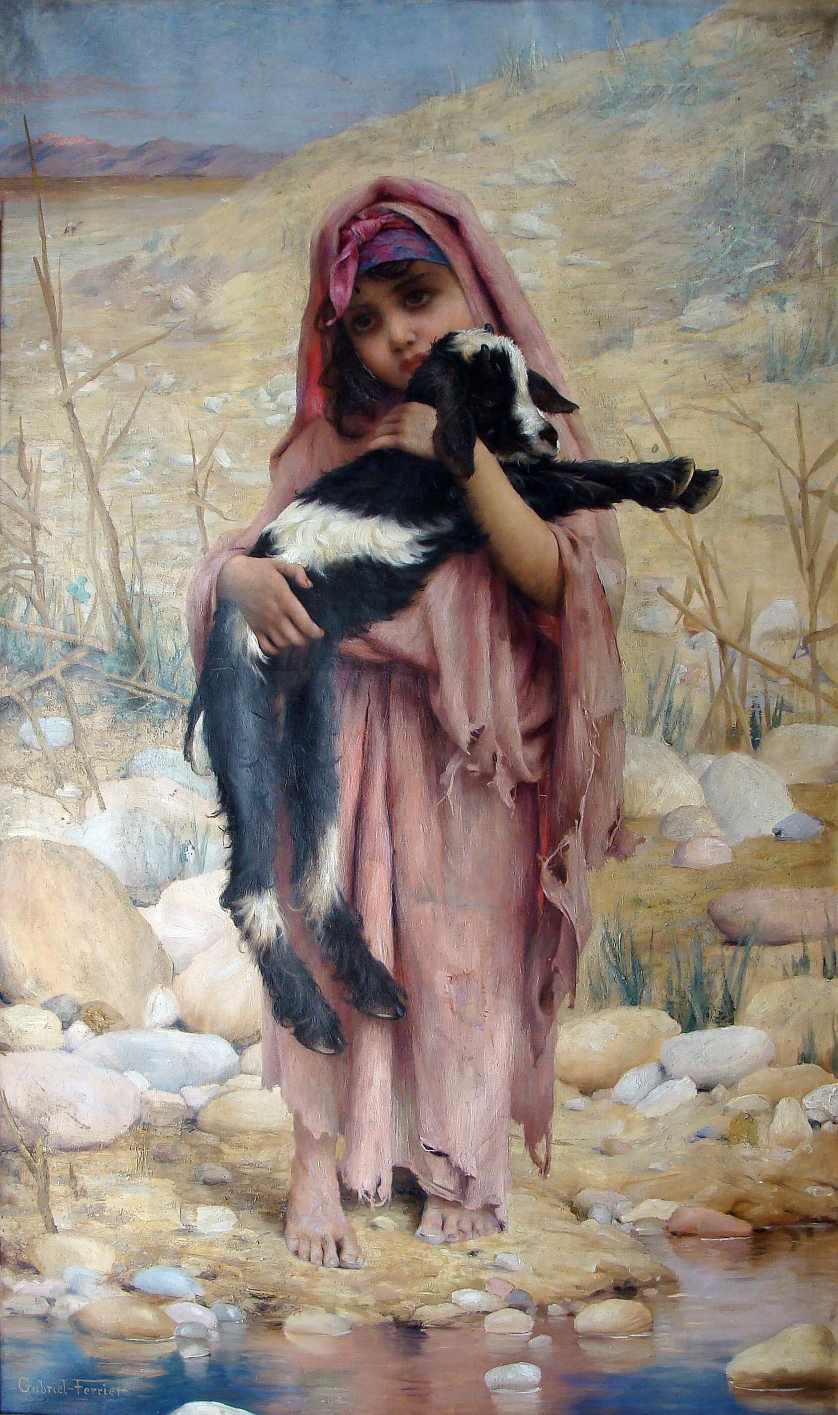 Tableau offert à Marthe North-Siegfried (1866-1939) et conservé à la Bibliothèque Pythagore de Strasbourg